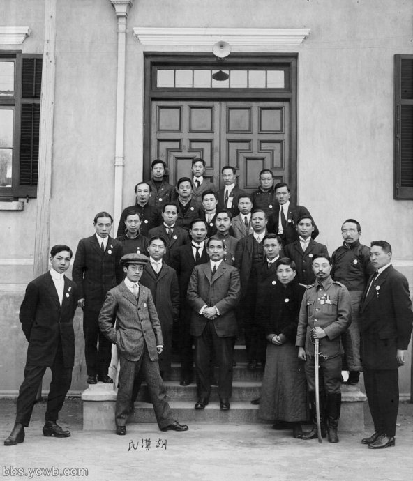 1912年，孙中山在南京与总统府职员合影。